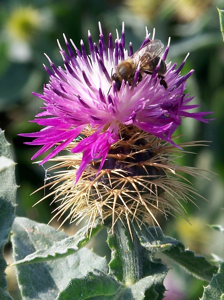 Centaurea seridis : Capítulo - Calle Orihuela con Camino de San Isidro, Albatera (Alicante, España).